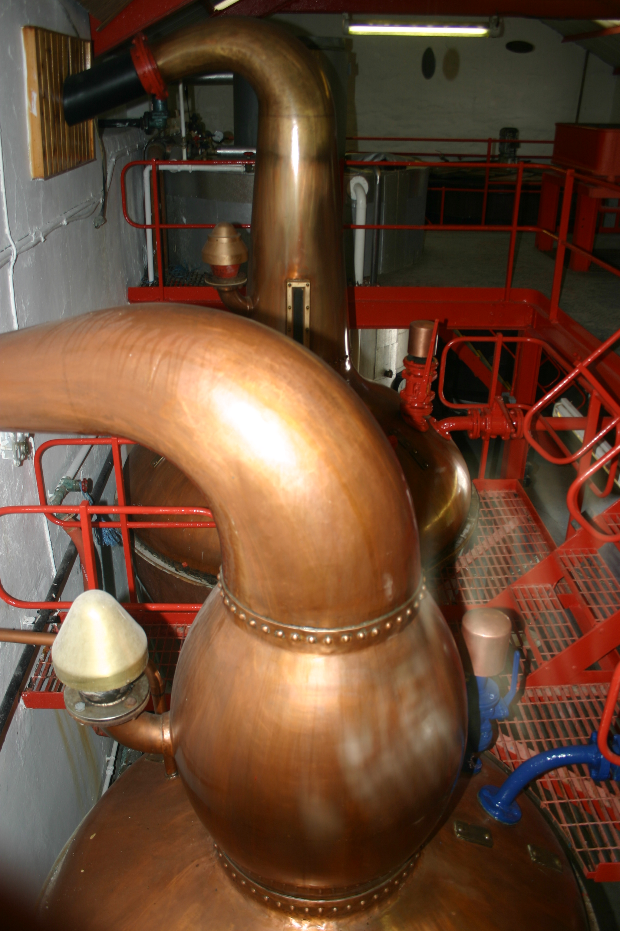 Zwei kupferne Brennblasen in der Edradour-Destillerie